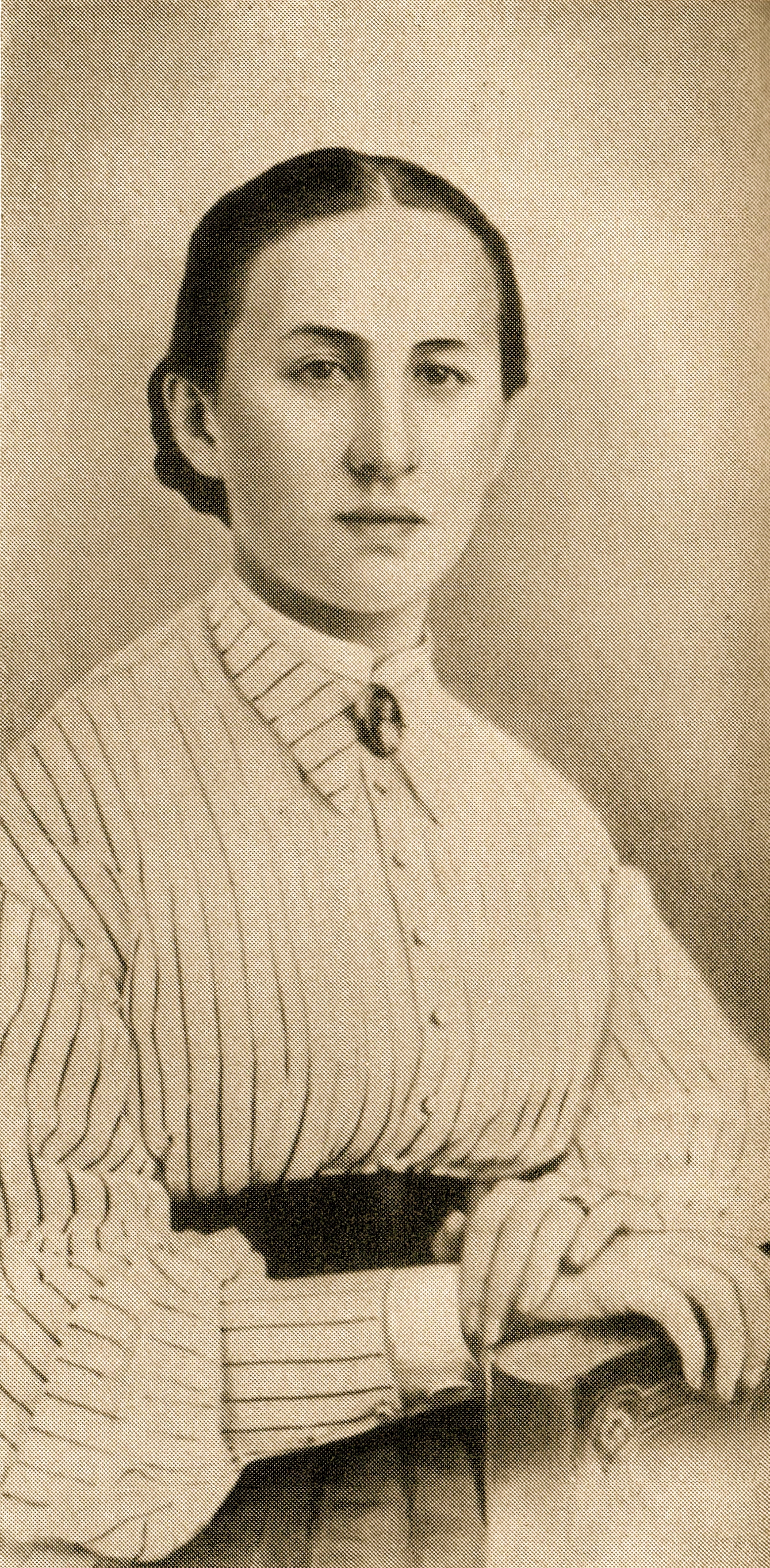 Елизавета Григорьевна Сапожникова - невеста, а в будущем супруга Саввы Мамонтова